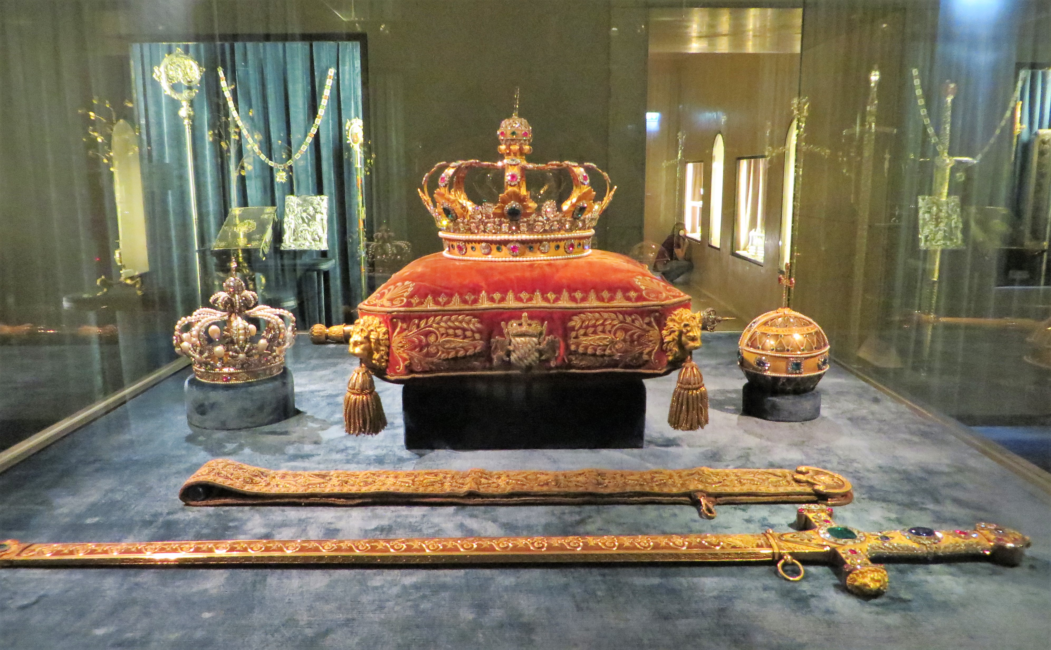 Bayrische Kroninsignien in der Schatzkammer der Münchner Residenz. Auf dem Präsentierkissen die Königskrone von 1806/07, außerdem die Krone der Königin, Szepter, Reichsapfel, Reichsschwert und Siegelkasten, angefertigt von der Werkstatt des Goldschmieds Martin-Guillaume Biennais in Paris.